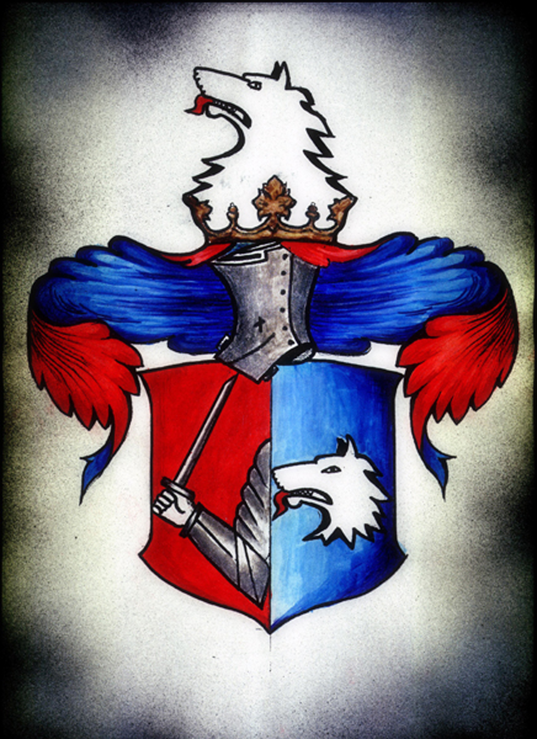 herb Wilczde Glowy 1714 r.